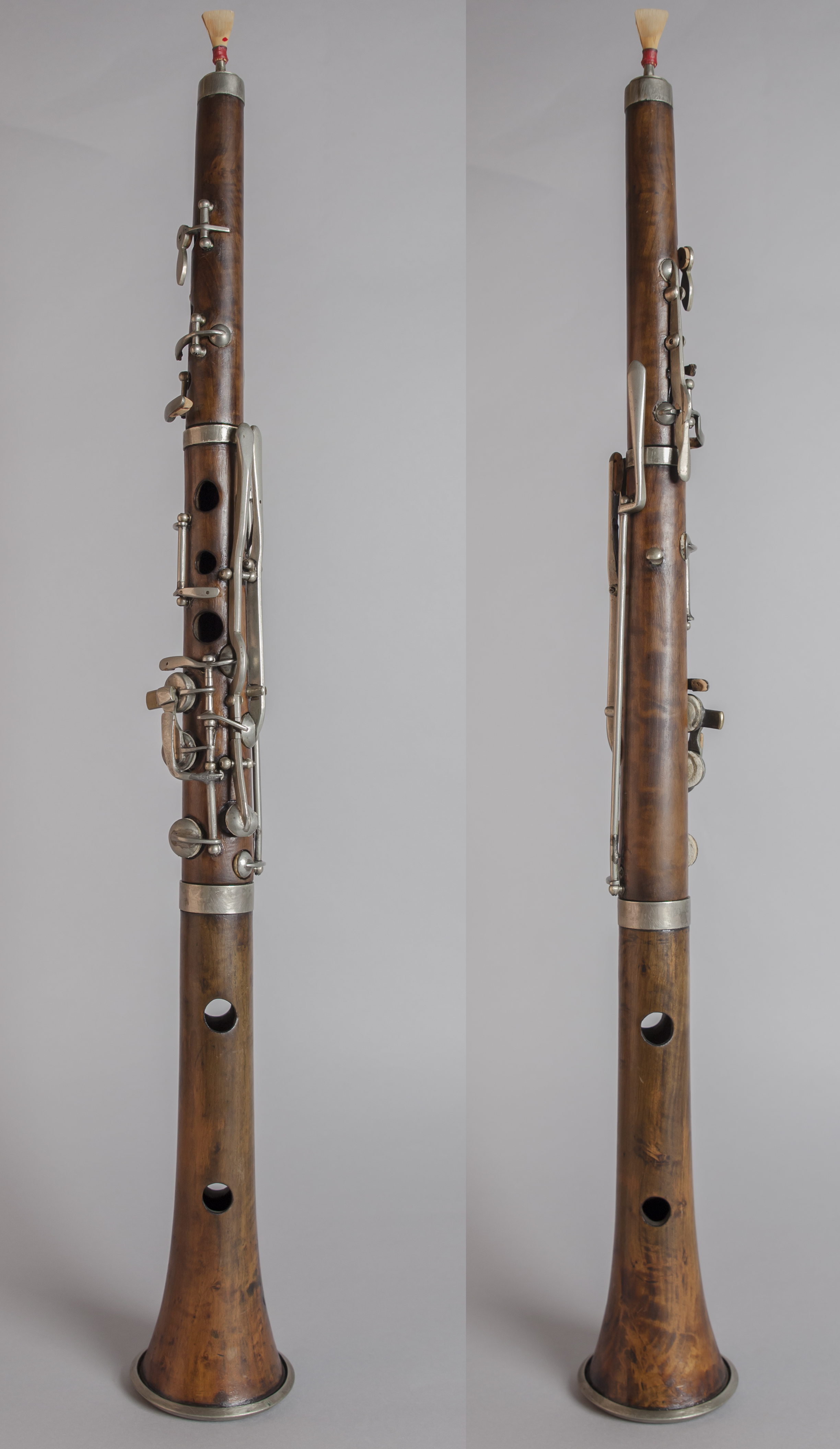 Tible, segle XX, MDMB 334